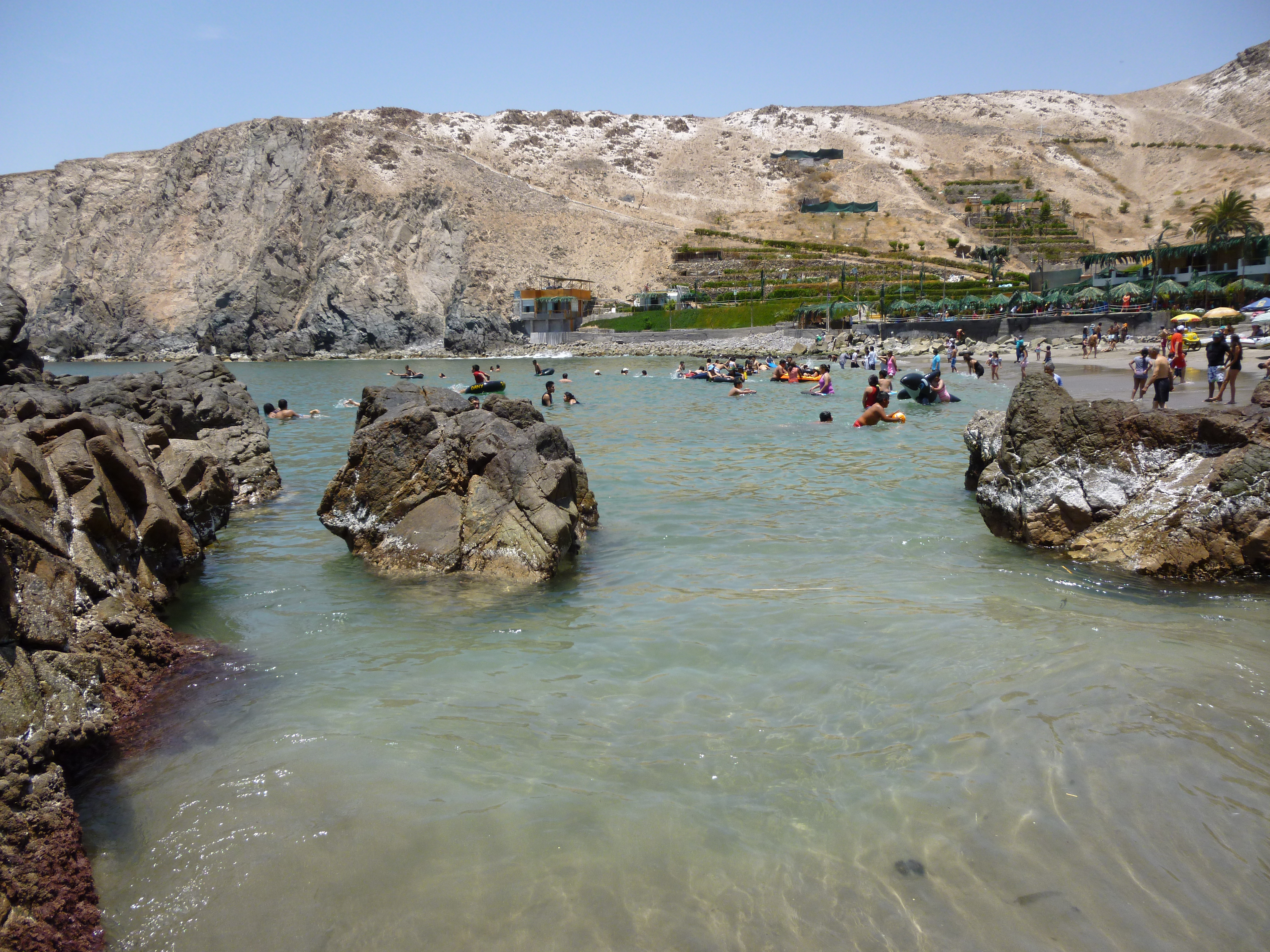 Playa Catarindo vista desde el lado izquierdo de la bahia